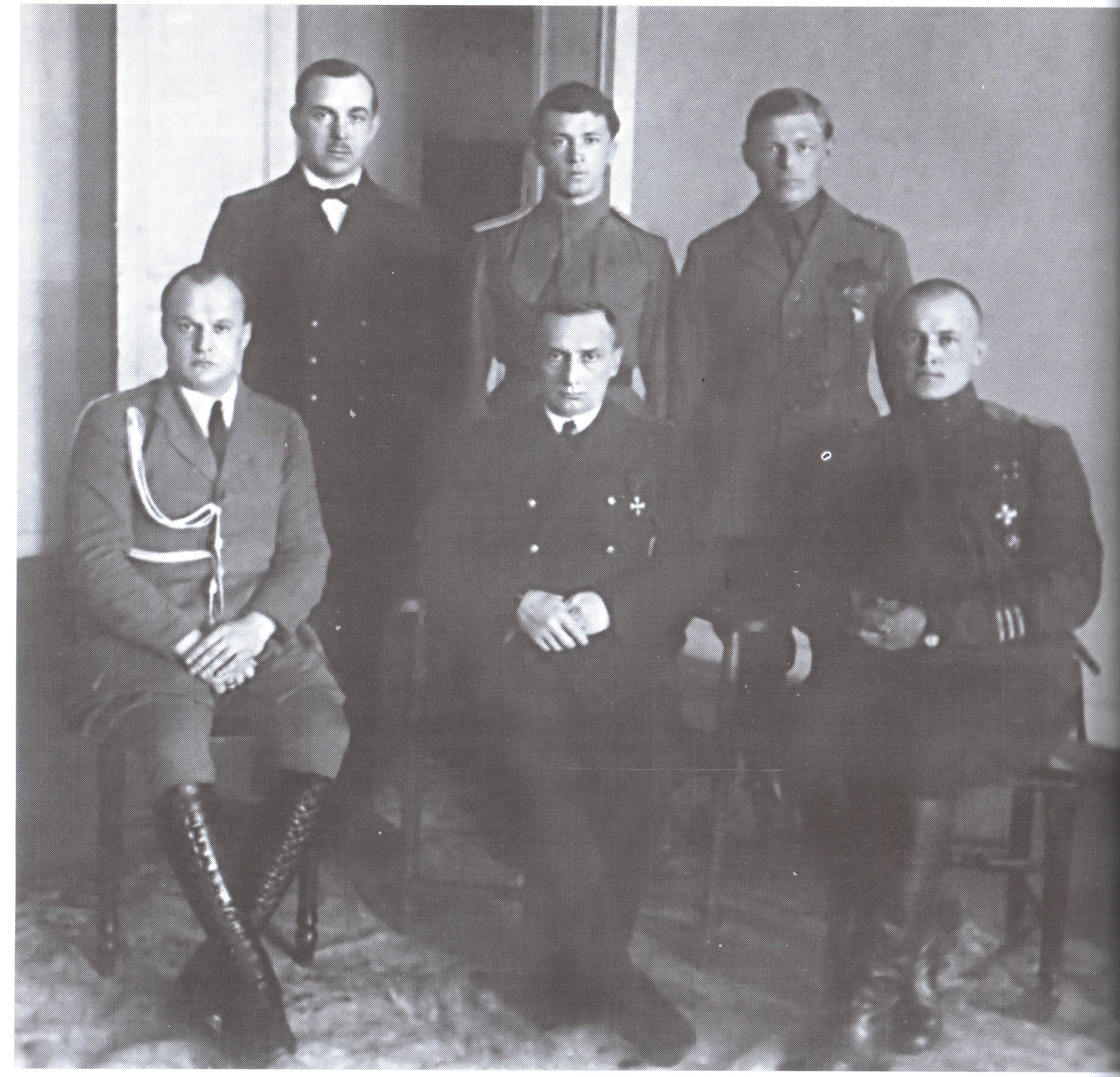 Вице-адмирал А.В. Колчак - военный министр Временного Всероссийского правительства со своим ближайшим окружением. Крайний справа (сидит) начальник охраны А.Удинцов. 1918 г.